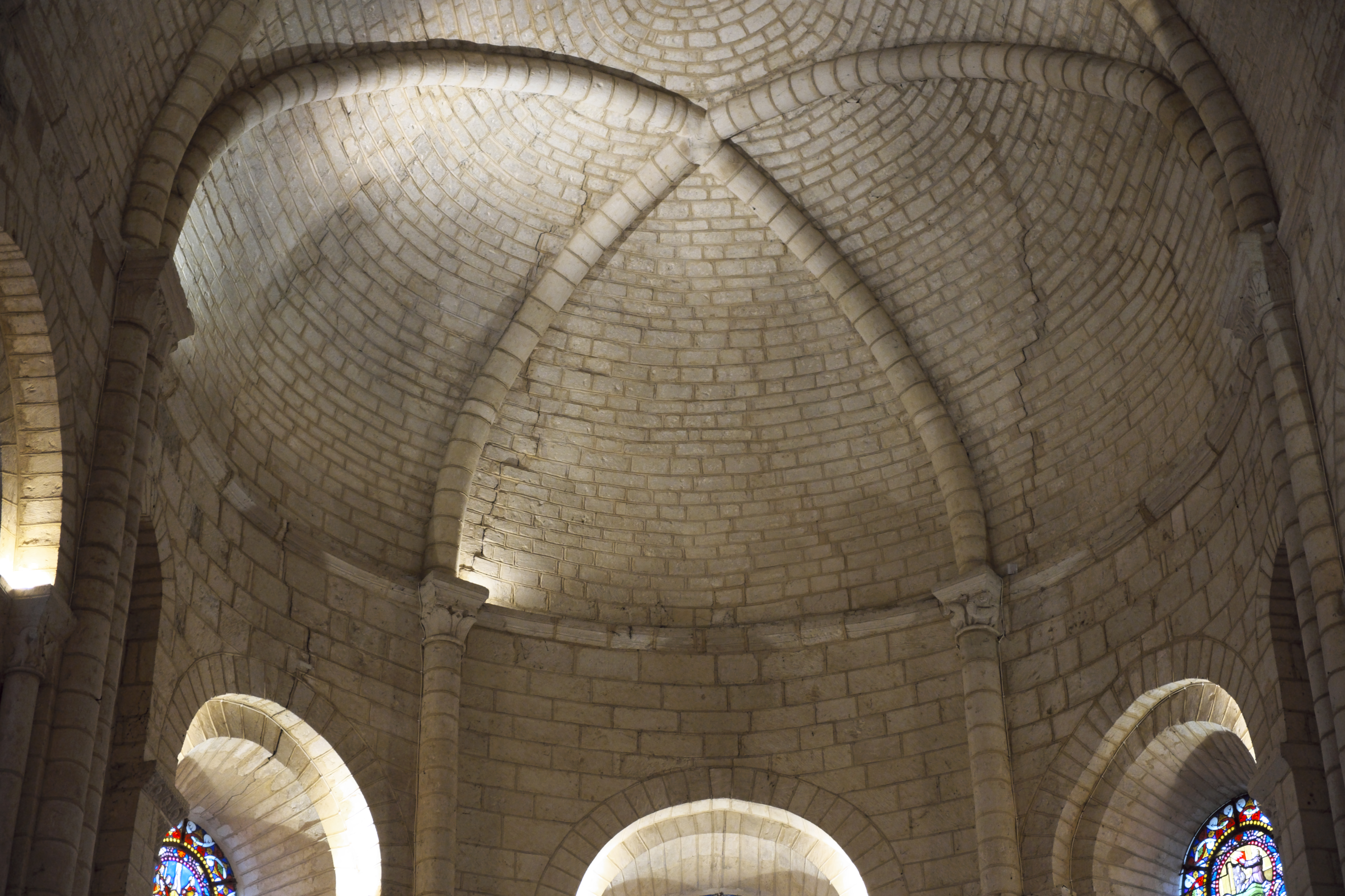 Kirche Notre-Dame-et-Saint-Junien in Lusignan im Département Vienne (Nouvelle-Aquitaine/Frankreich), Gewölbe